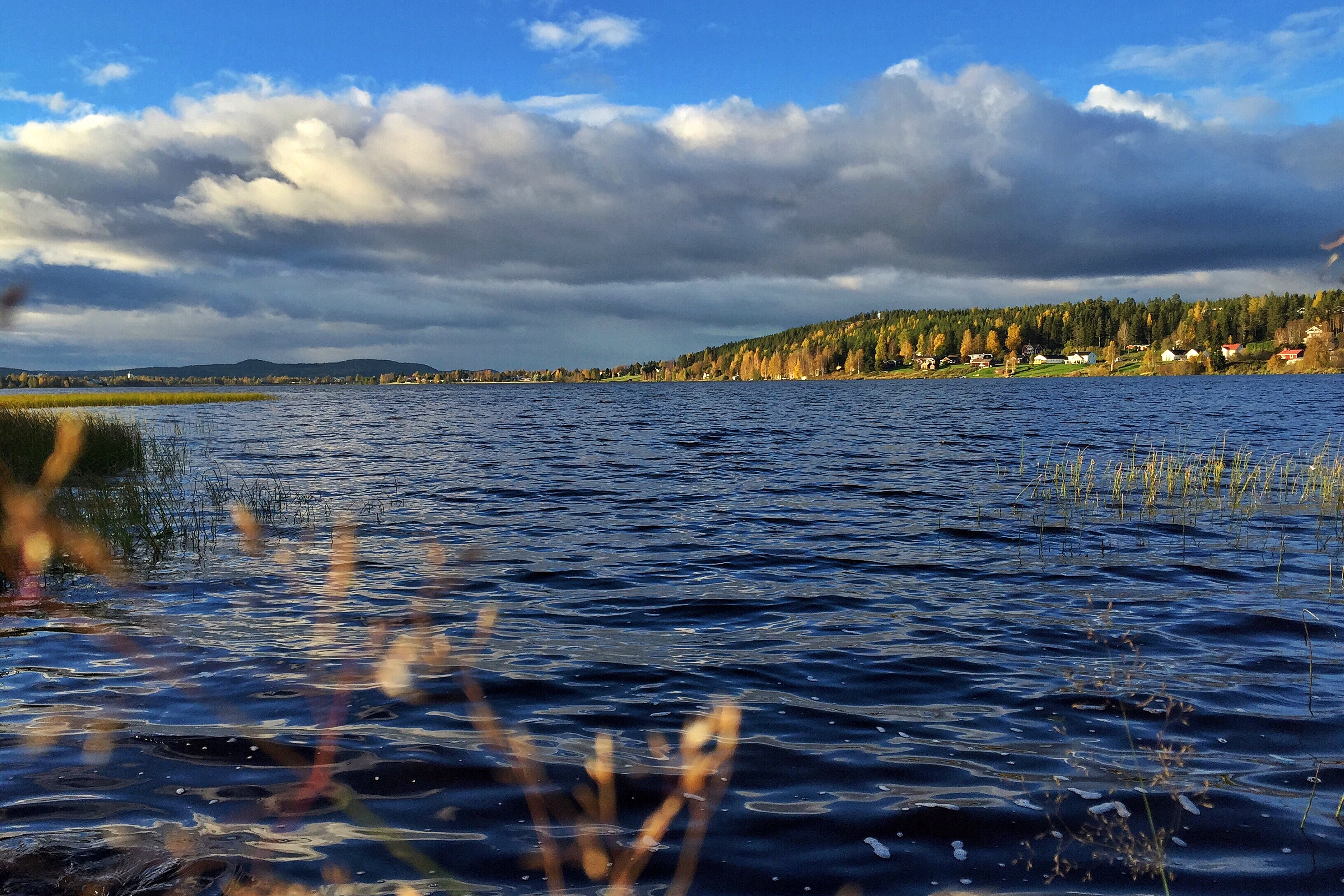 Svartbyträsket är en sjö i Bodens kommun i Norrbotten och ingår i Luleälvens huvudavrinningsområde. Sjön har en area på 1,37 kvadratkilometer och ligger 7 meter över havet. Vy från strandkant i södra svartbyn. Ute till vänster skymtas Överluleå kyrkas vita torn. Rakt över sjön syns Svedjebergsfästet.